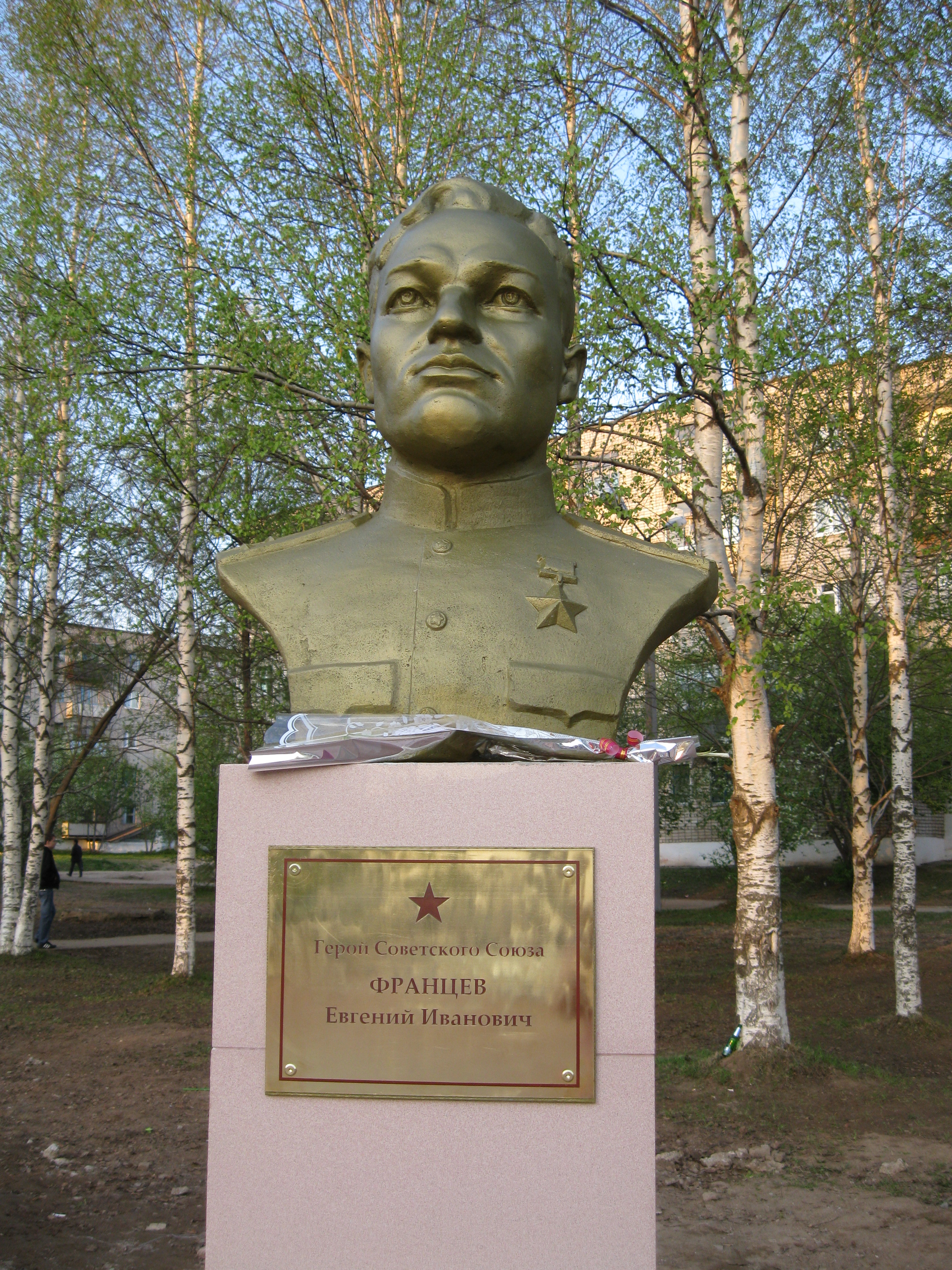 Бюст Евгения Ивановича Францева на Аллее Славы, открытой 09.05.2010 года в городе Чернушка.